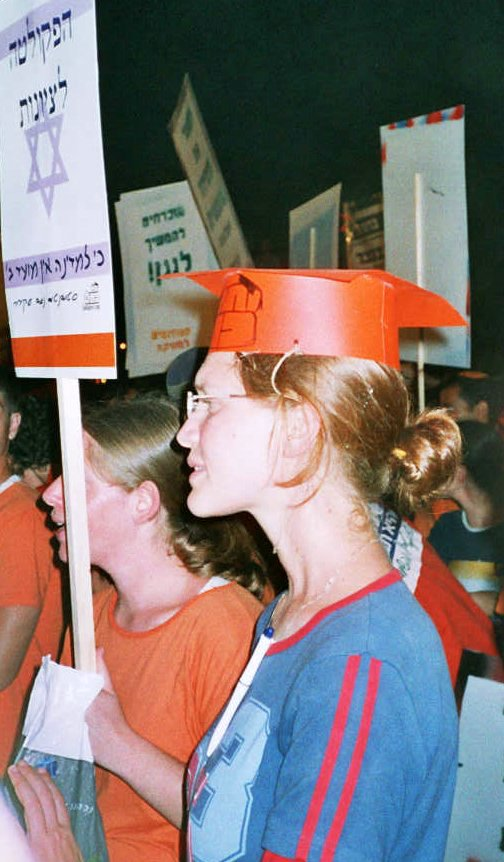 חברת תא כתום מפגינה על פי :he:שיחה:תוכנית ההתנתקות#אנא מי שיכול הוסף תמונה זו| . גילגמש • שיחה 10:13, 22 אוגוסט 2005 (UTC)